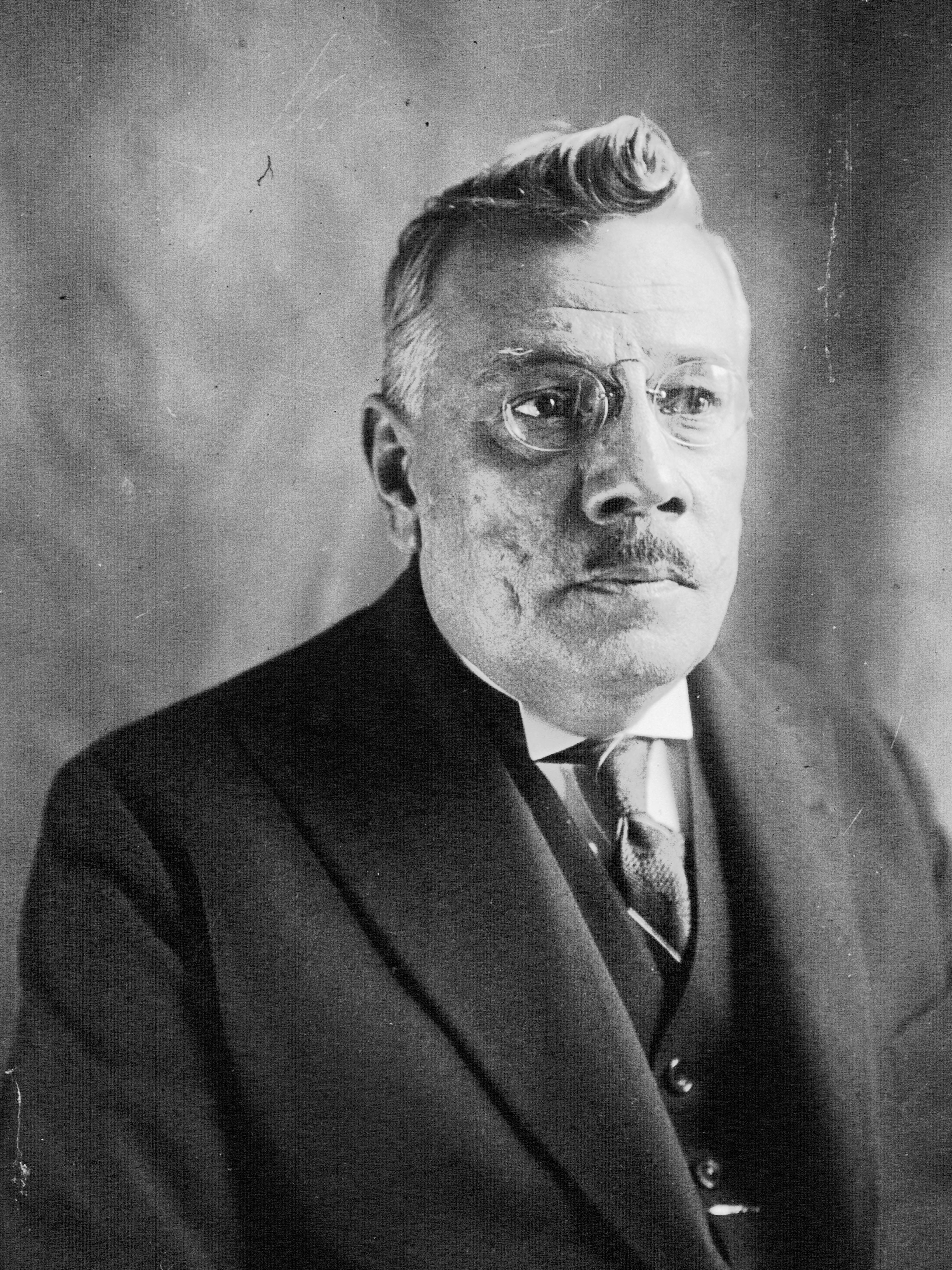 Alcide Delmont, député [photographie de presse]